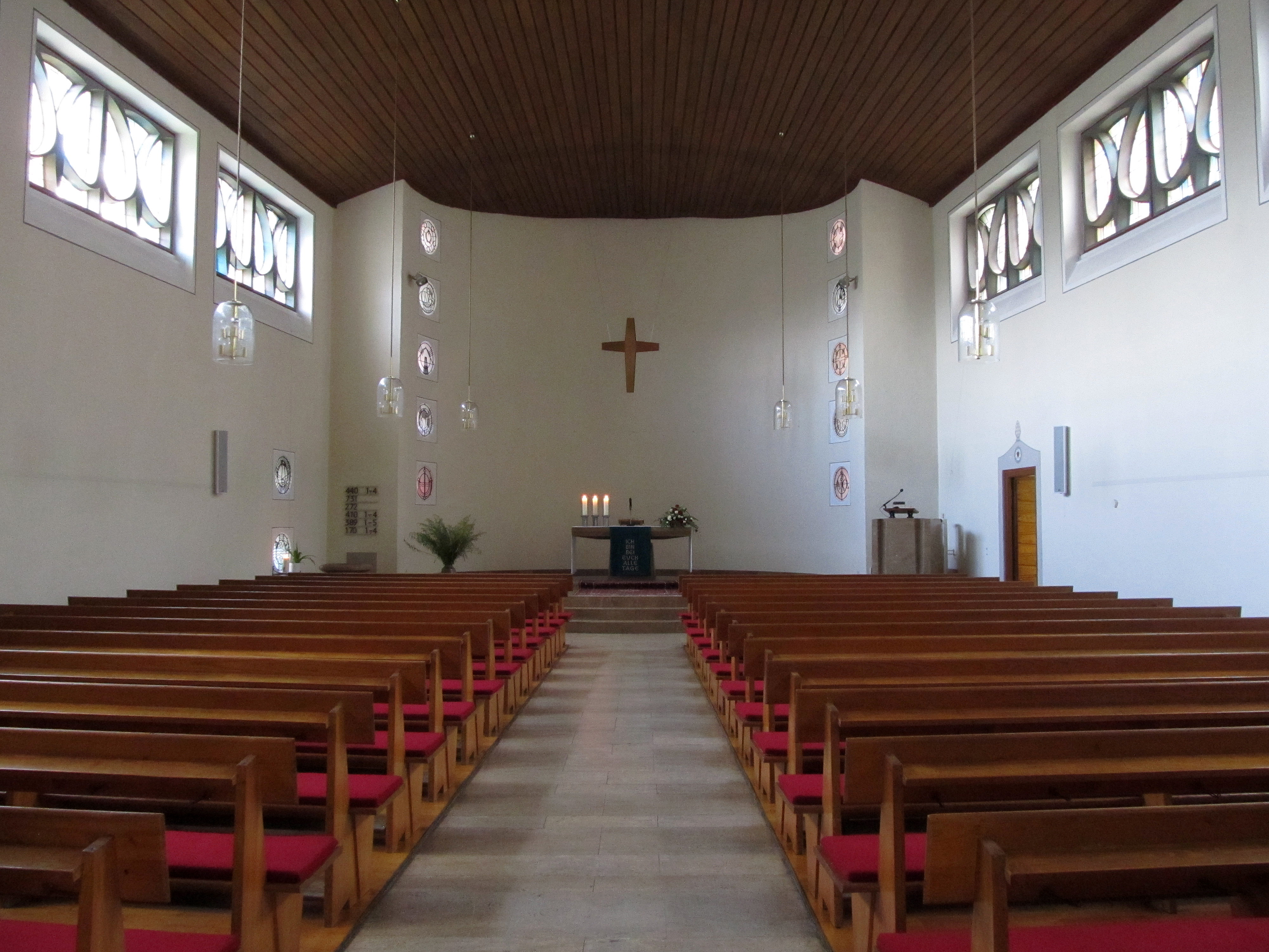 Blick ins Innere der protestantischen Christuskirche in Schwarzenacker, einem Stadtteil von Homburg, Saarland